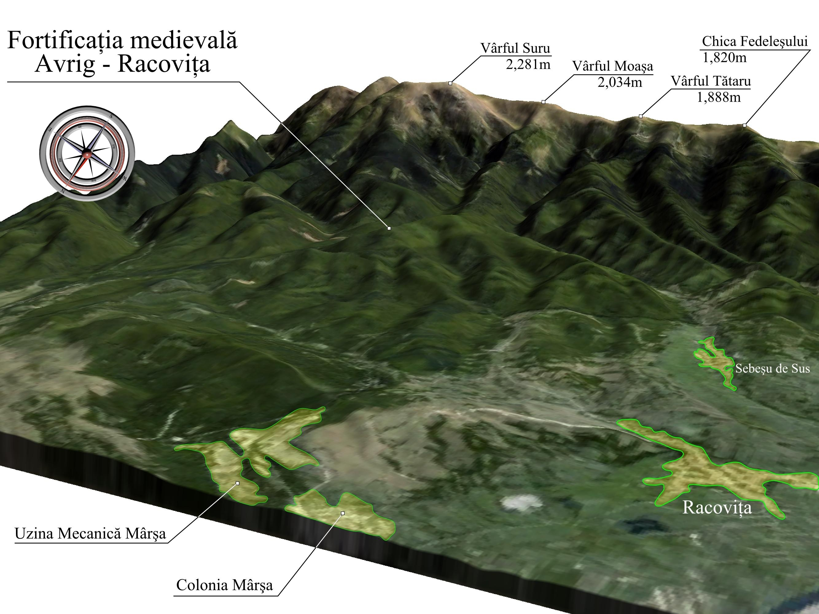 Amplasarea zonală a Fortificaţiei medievale Avrig - Racoviţa.